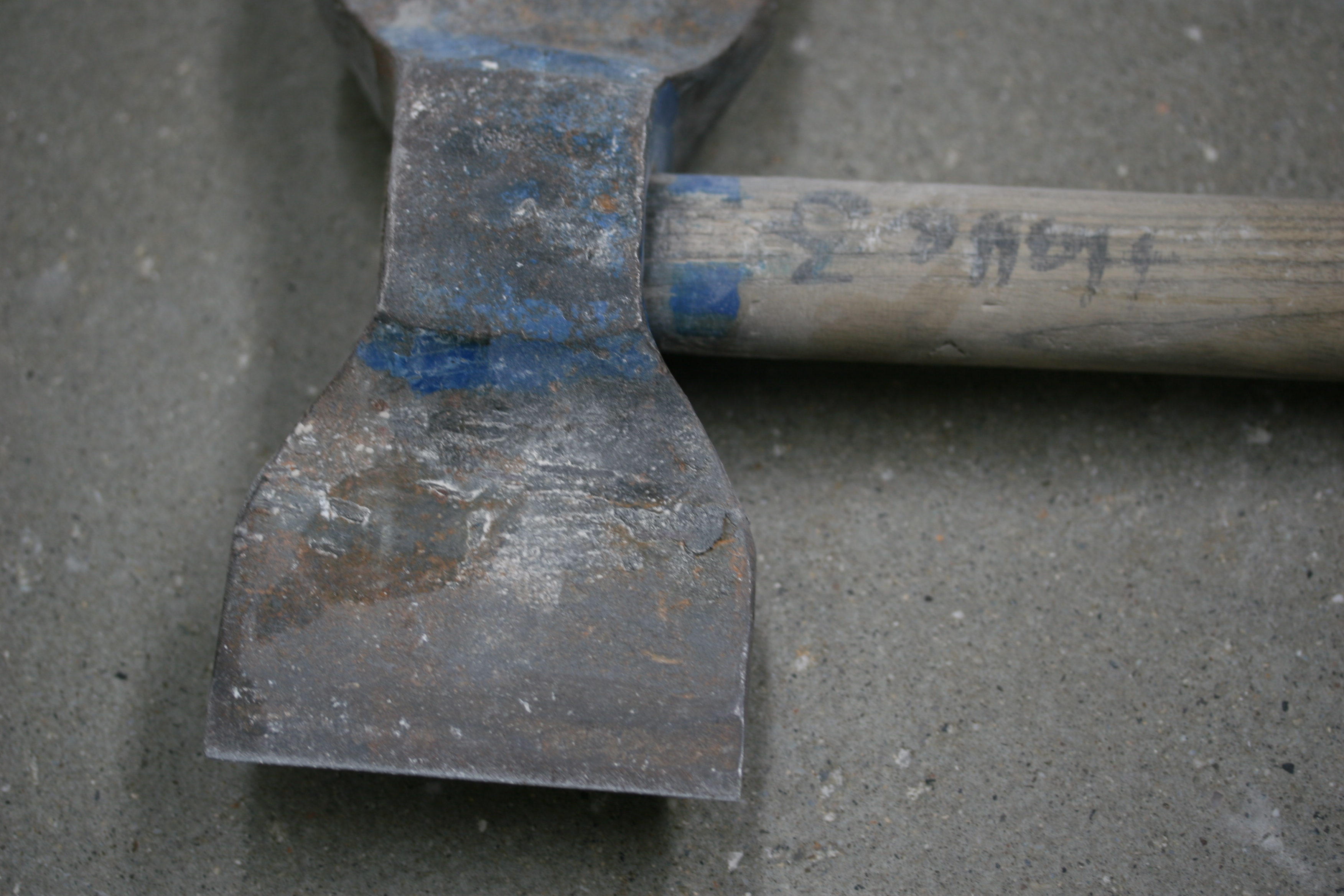 Glattfläche